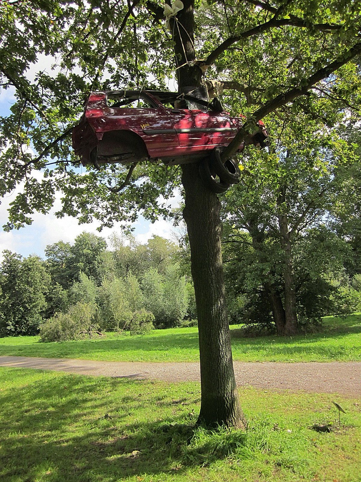 "Falschfahrer", 2010 von János Nádasdy in der Gemeinschaftsausstellung "Klanggärten - Kunst am Baum" mit der Gruppe 7 am Vierthaler Teich in Hannover, veranstaltet von der Gartenregion Hannover, organisiert durch Dagmar Brand ...